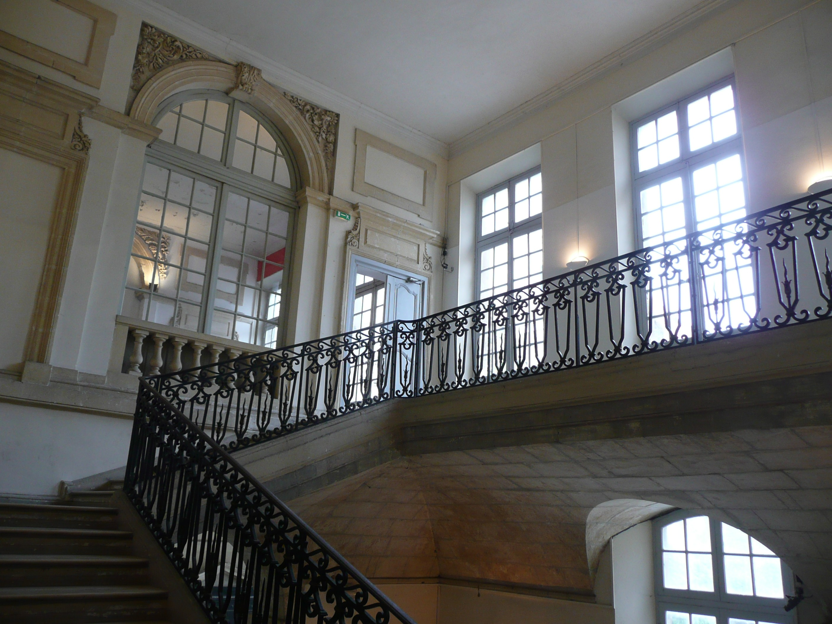 Arles (Bouches-du-Rhône, France), à l'est de la place de la République, palais archiépiscopal, montée d'escalier monumentale.